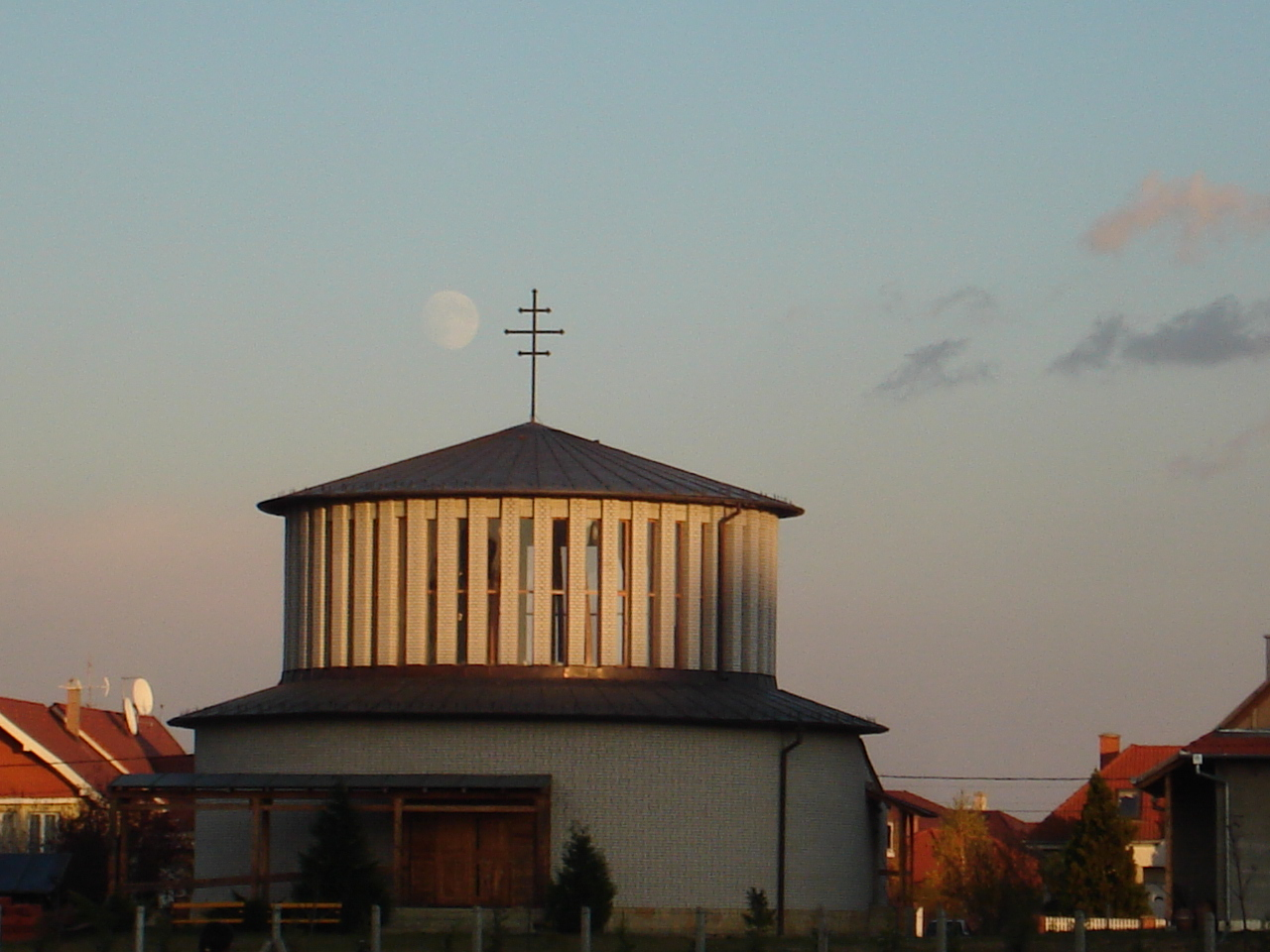 Szolnoki görög-katolikus templom.